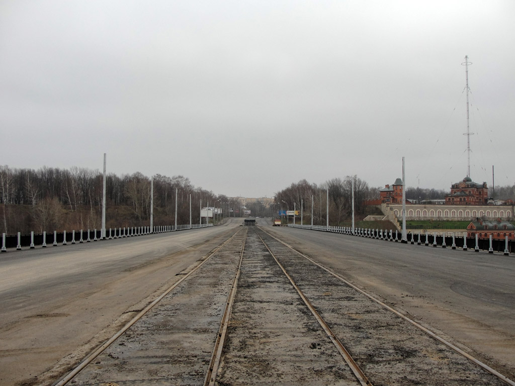 Казань, проспект Хусаина Ямашева, мост через р.Казанка